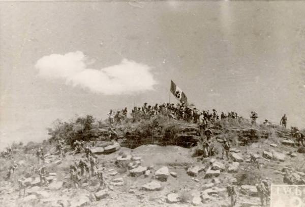 In cima all'altura sassosa sono arrivati i soldati del III° Battaglione della Divisione Sila e sventolano in alto la bandiera d'Italia. Altri militari sono sparsi sull'altura.